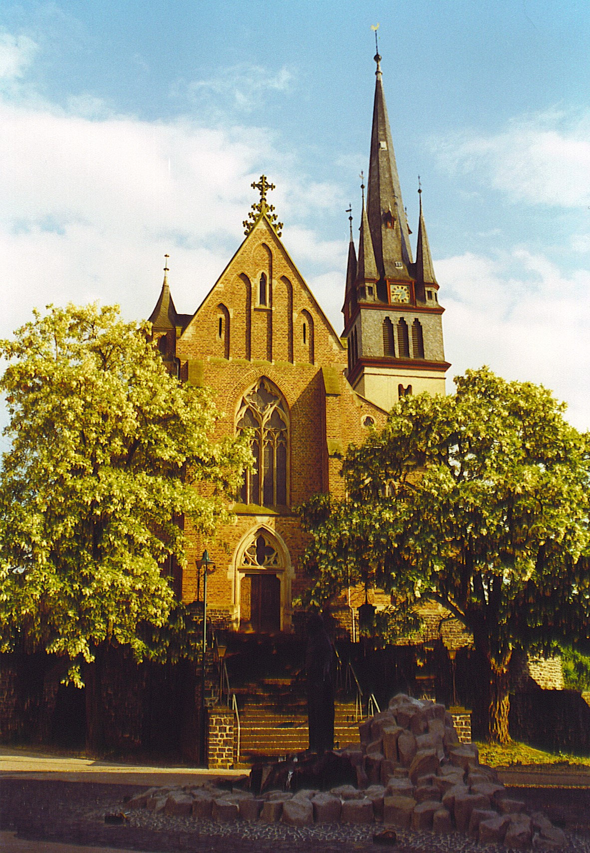 Kath. Pfarrkirche "St. Aegidus" zu Obertiefenbach (Beselich)